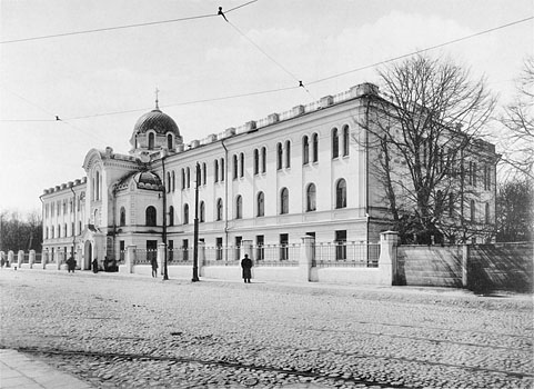 99. УбЪжище имени С. и А. Тарасовыхъ для престарЪлыхъ на ШаболовкЪ. (Москва)